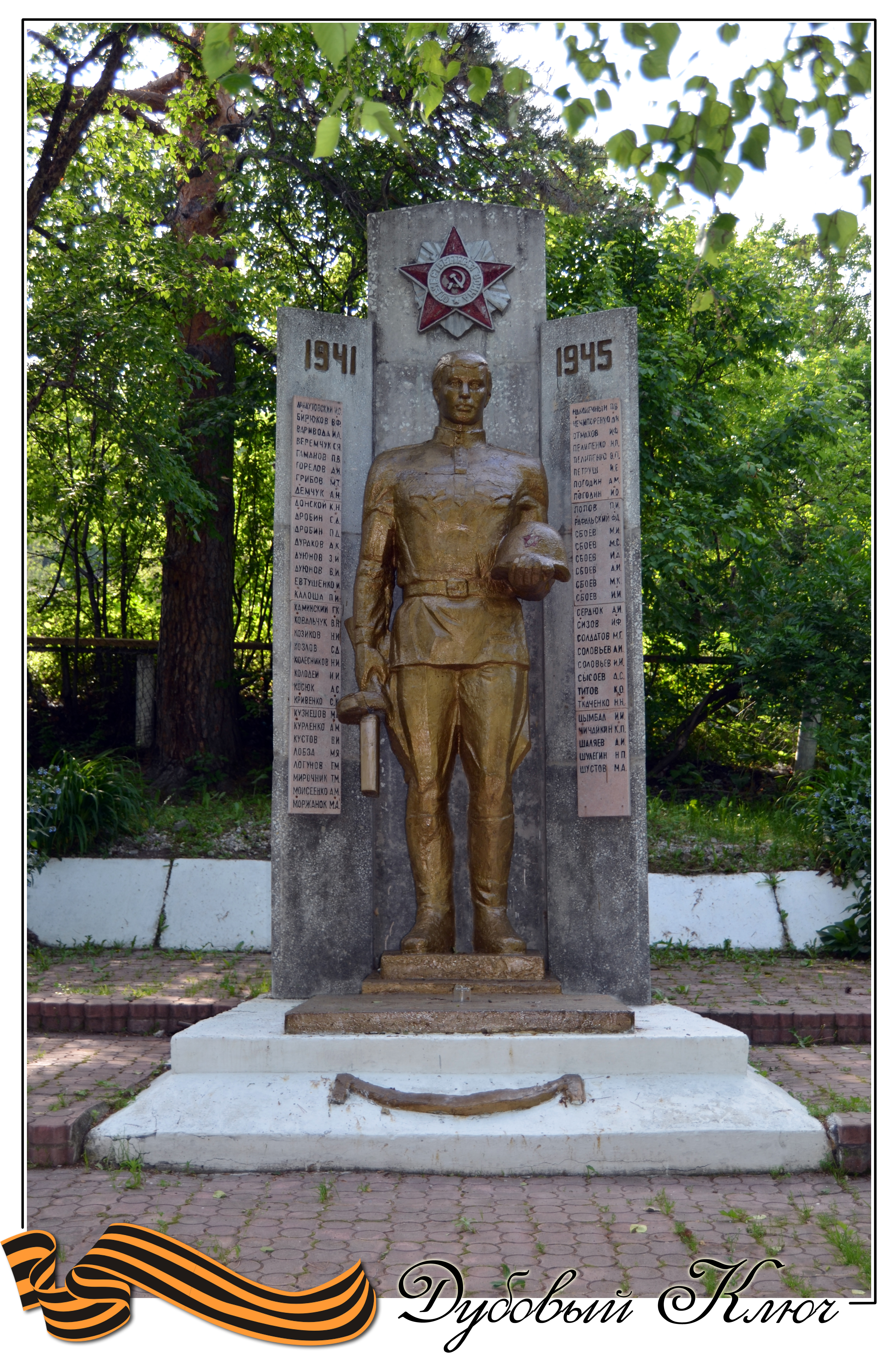 Памятник односельчанам, погибшим в годы Великой Отечественной войны 1941-1945.